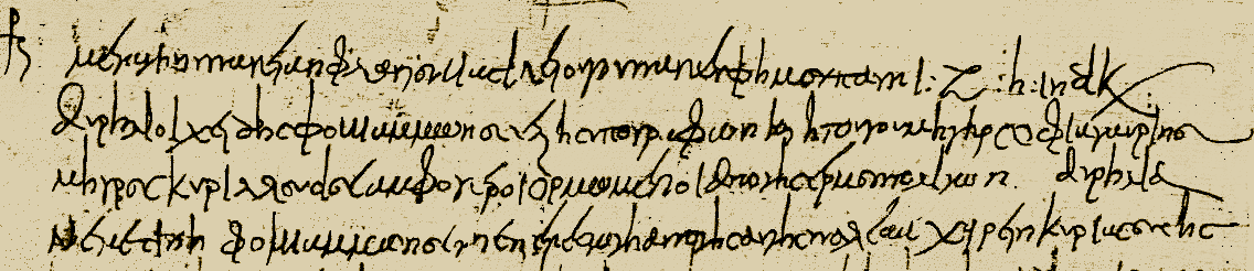 Greek manuscript in ancient cursive script, papyrus, dated 545 A.D., Brit. Mus. Pap. 1319 (now British Library Pap. 1319) Text: Debenture Transcription: ΧΡ μετα την υπατειαν Φλαυιου Βασιλειου του πανευφημου Παυνι : ζ : η: ινδικ/ Αυρηλιοι Χειδης Φοιβαμμωνος εξης υπογραφων και η τουτου μητηρ Σοφια Ταυρινου μητρος Κυριλλουδος αμφοτεροι ορμωμενοι απο της Ερμουπολιτων Αυρηλια Νεμεσιλλη Φοιβαμμωνος τη ε[υγ]ενεστατη απο της αυτης πολεως χαιρειν κυριας ουσης